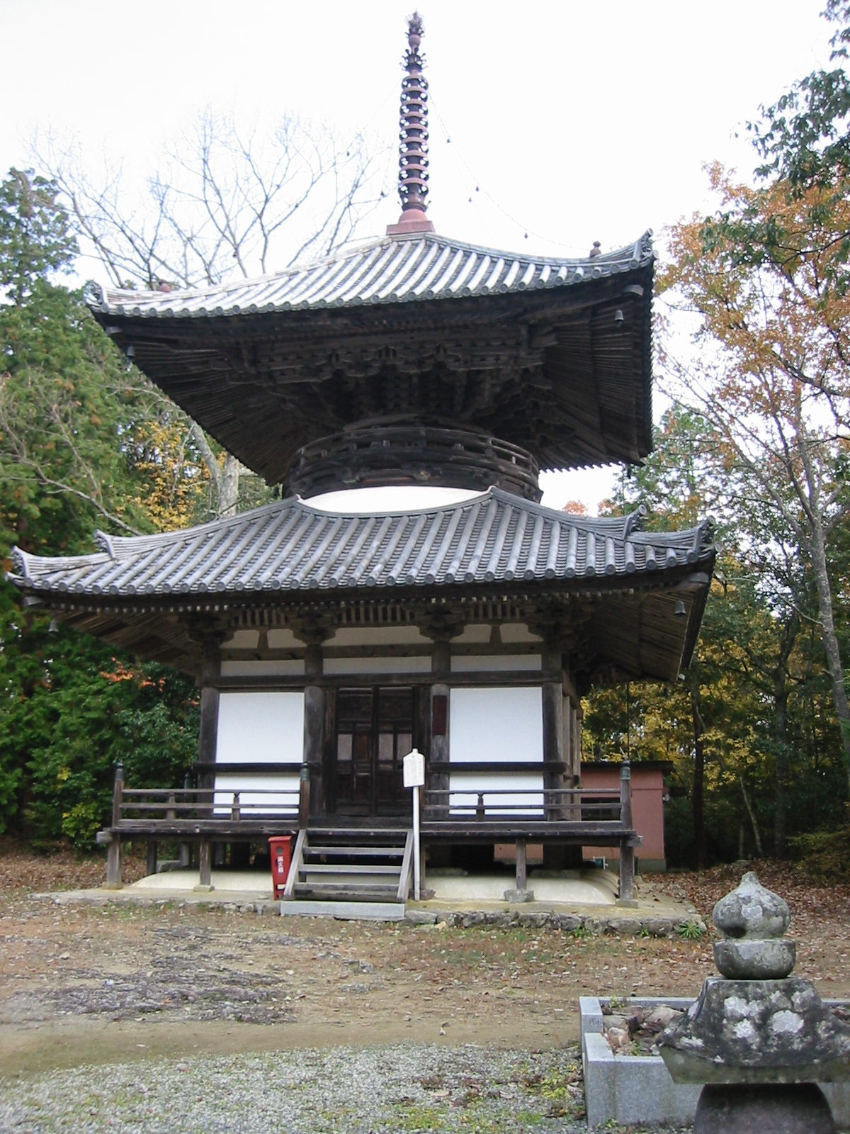 朝光寺 多宝塔